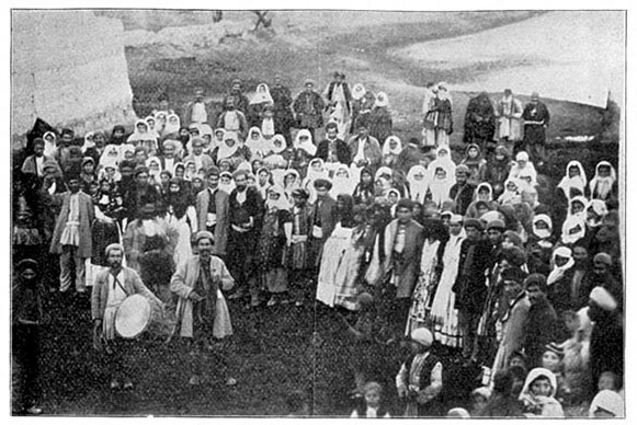 Nestorian wedding